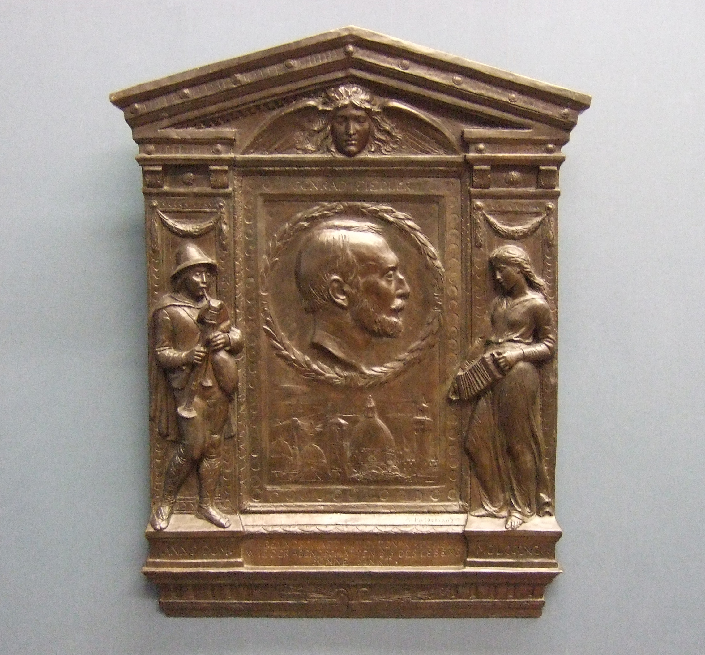 Gedenktafel Konrad Fiedler.